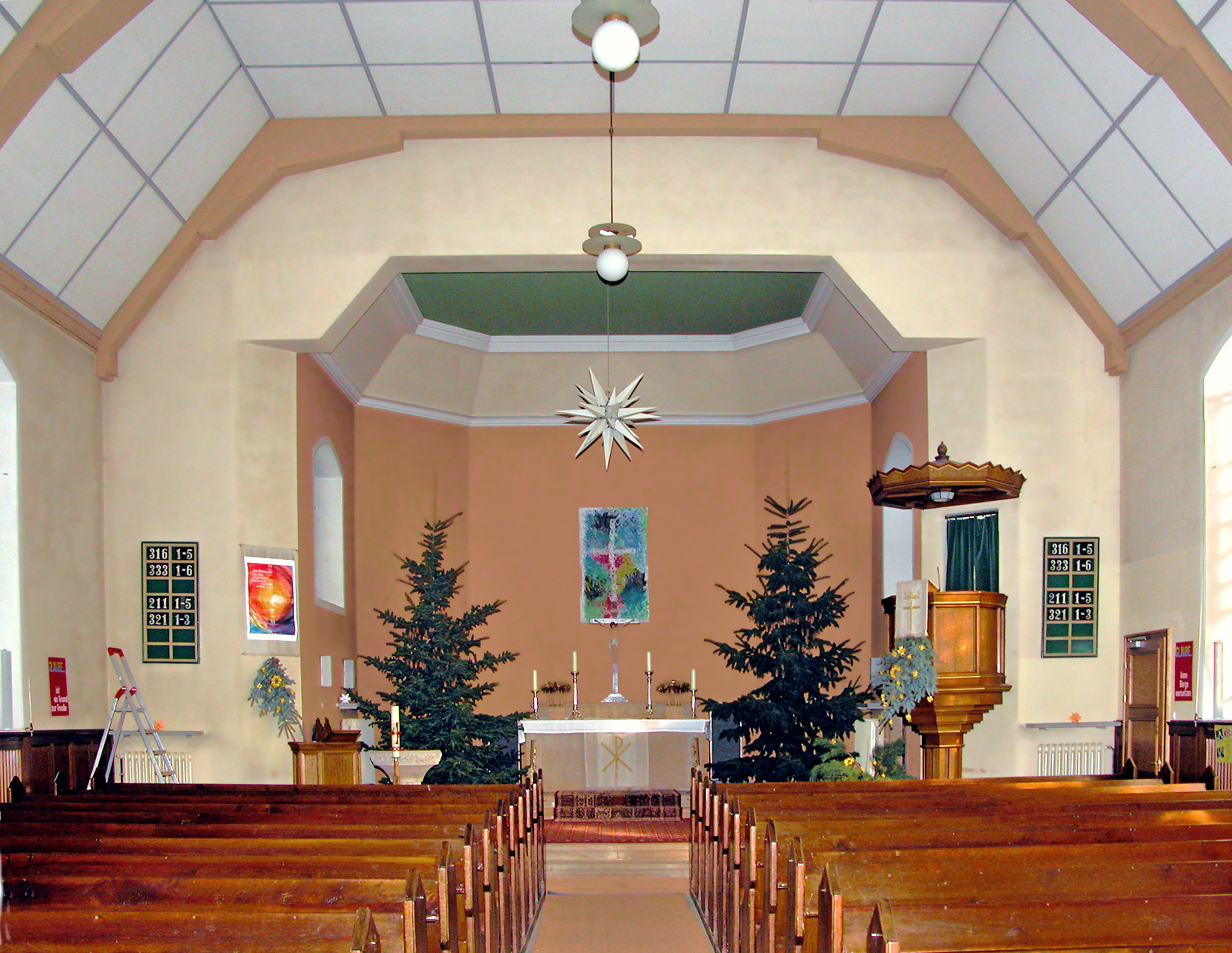 30.01.2010 01734 Oelsa (Rabenau): Evangelische Kirche Oelsa, Pfarrweg 12 (GMP: 50.950678,13.666927). Schlichte Saalkirche aus der Mitte der 1920er Jahre. [DSCN40370.TIF]20100130020DR.JPG(c)Blobelt